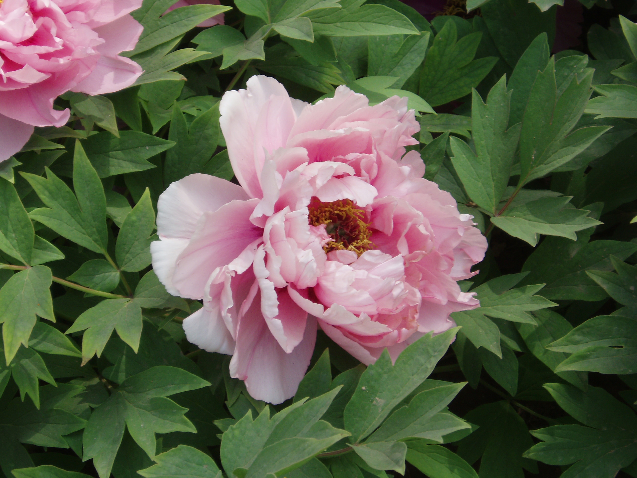 Peony